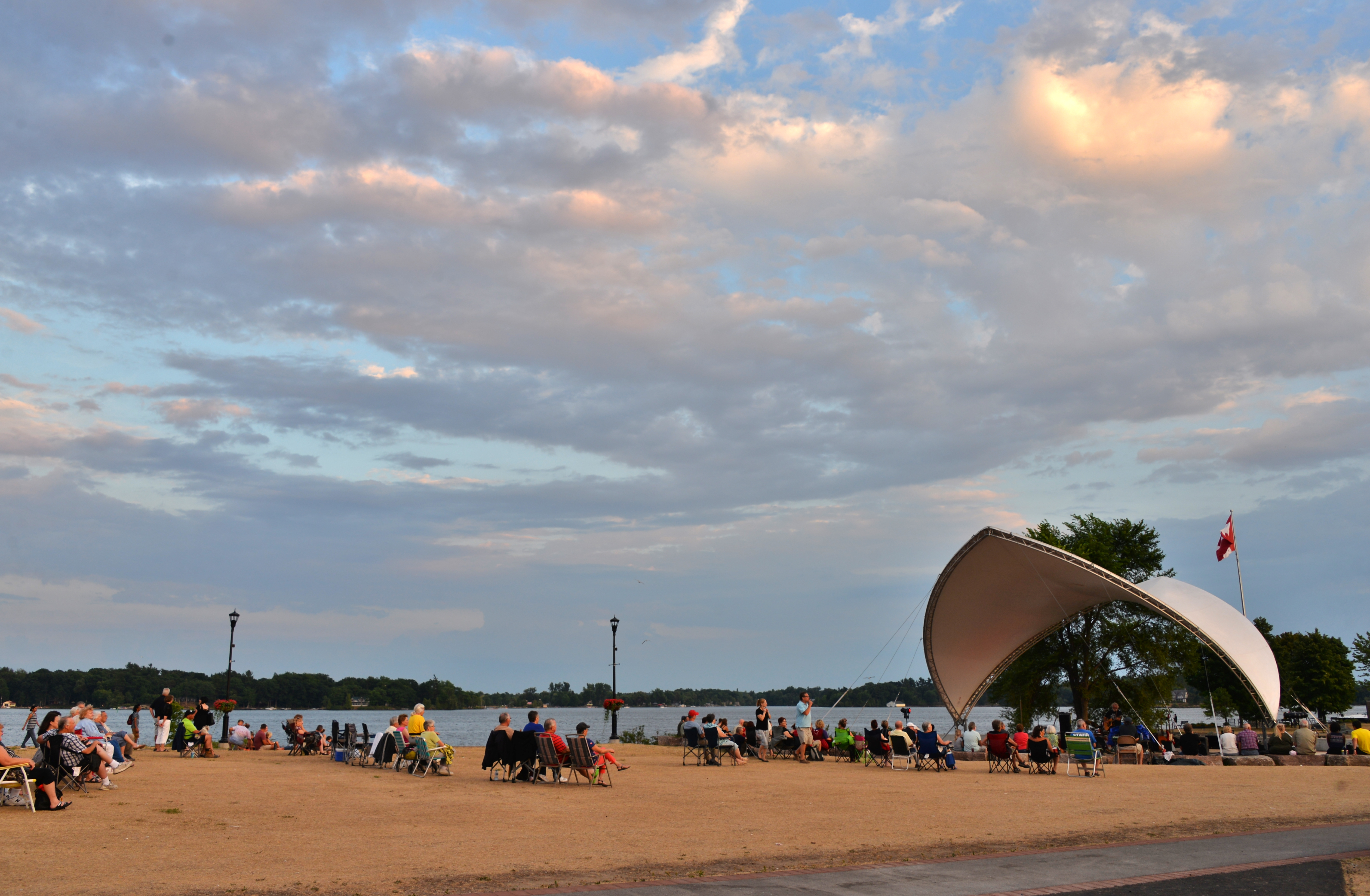 Публічний концерт на пляжі Ґананокве